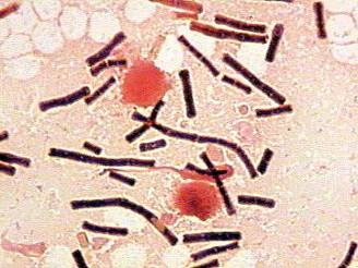 Fotografía obtenida mediante tinción de Gram a partir de sangre periférica de una oveja